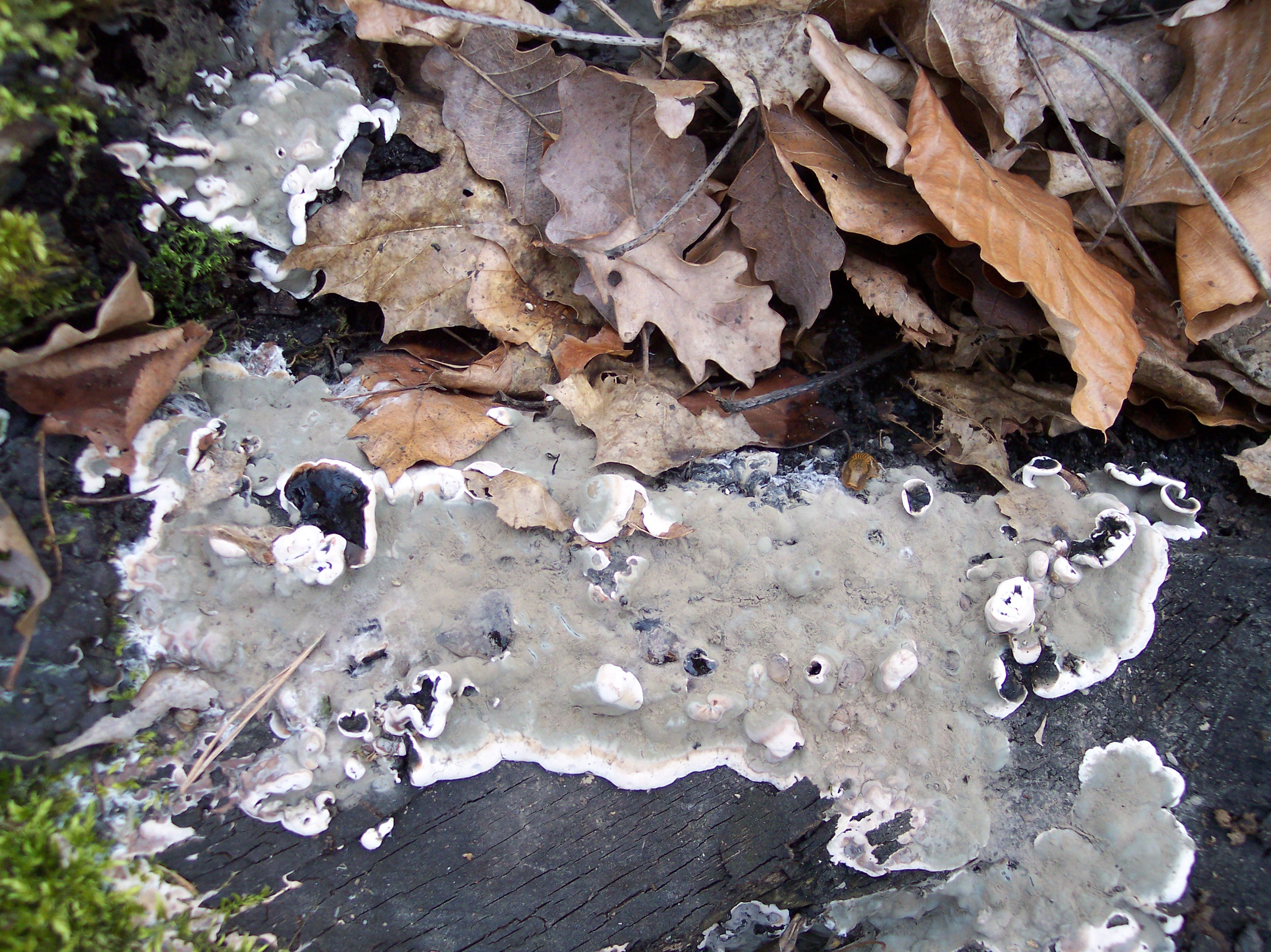 Nebenfruchtform des Brandkrustenpilzes (Kretzschmaria deusta)